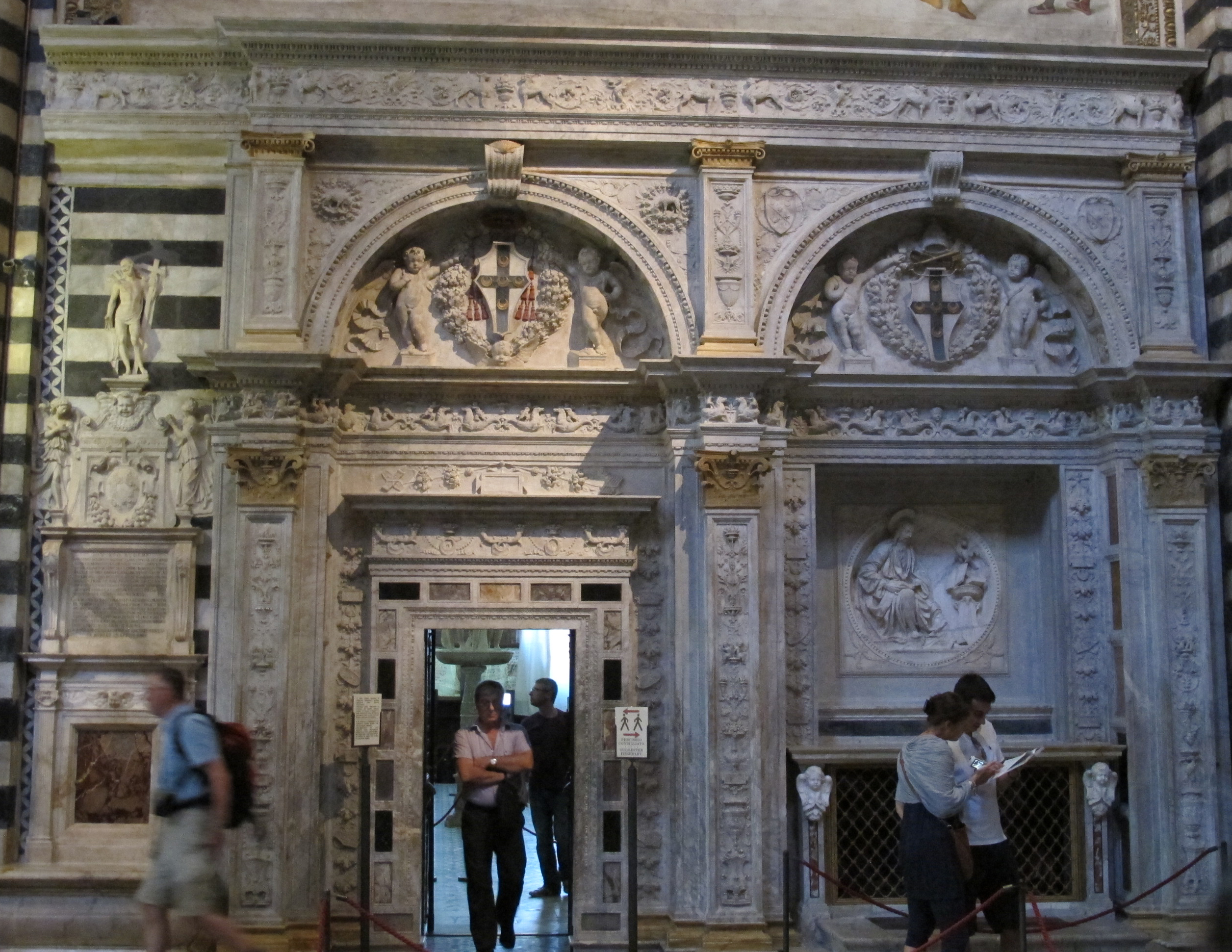 Portale della libreria piccolomini del marrina